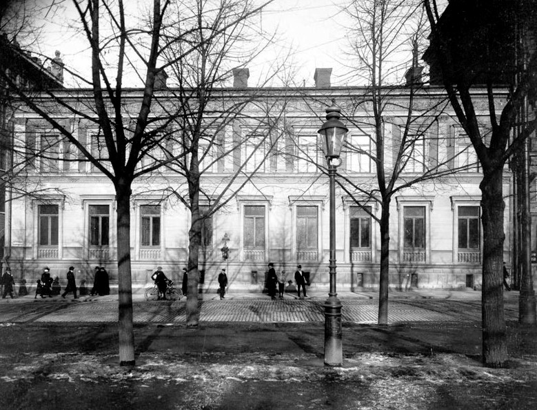 Kungsträdgårdsgatan 14, Barclayska huset och allén framför. Även kallat Wallenbergska huset 1915. Byggt 1856-1857. Rivet 1916.